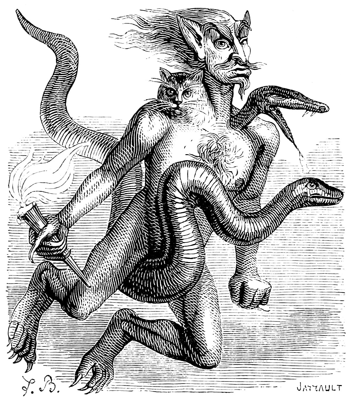 Illustration du Dictionnaire infernal par Louis Le Breton, Illustration du Dictionnaire infernal de Jacques Auguste Simon Collin de Plancy par Louis Le Breton, 6eme édition, 1863.